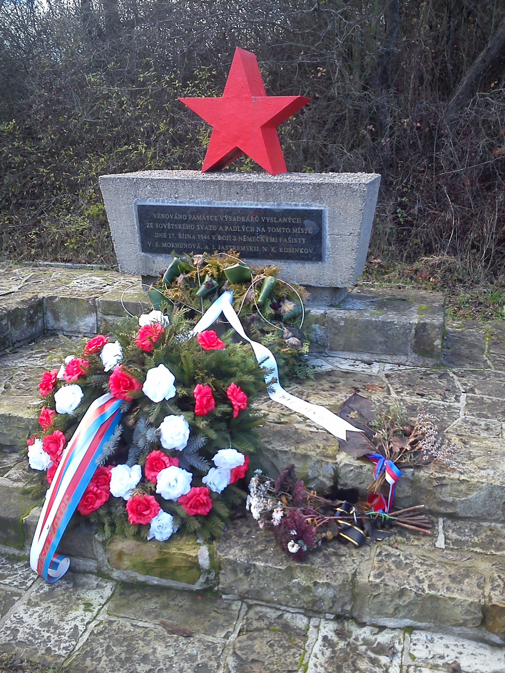 Prostor pro kladení věnců